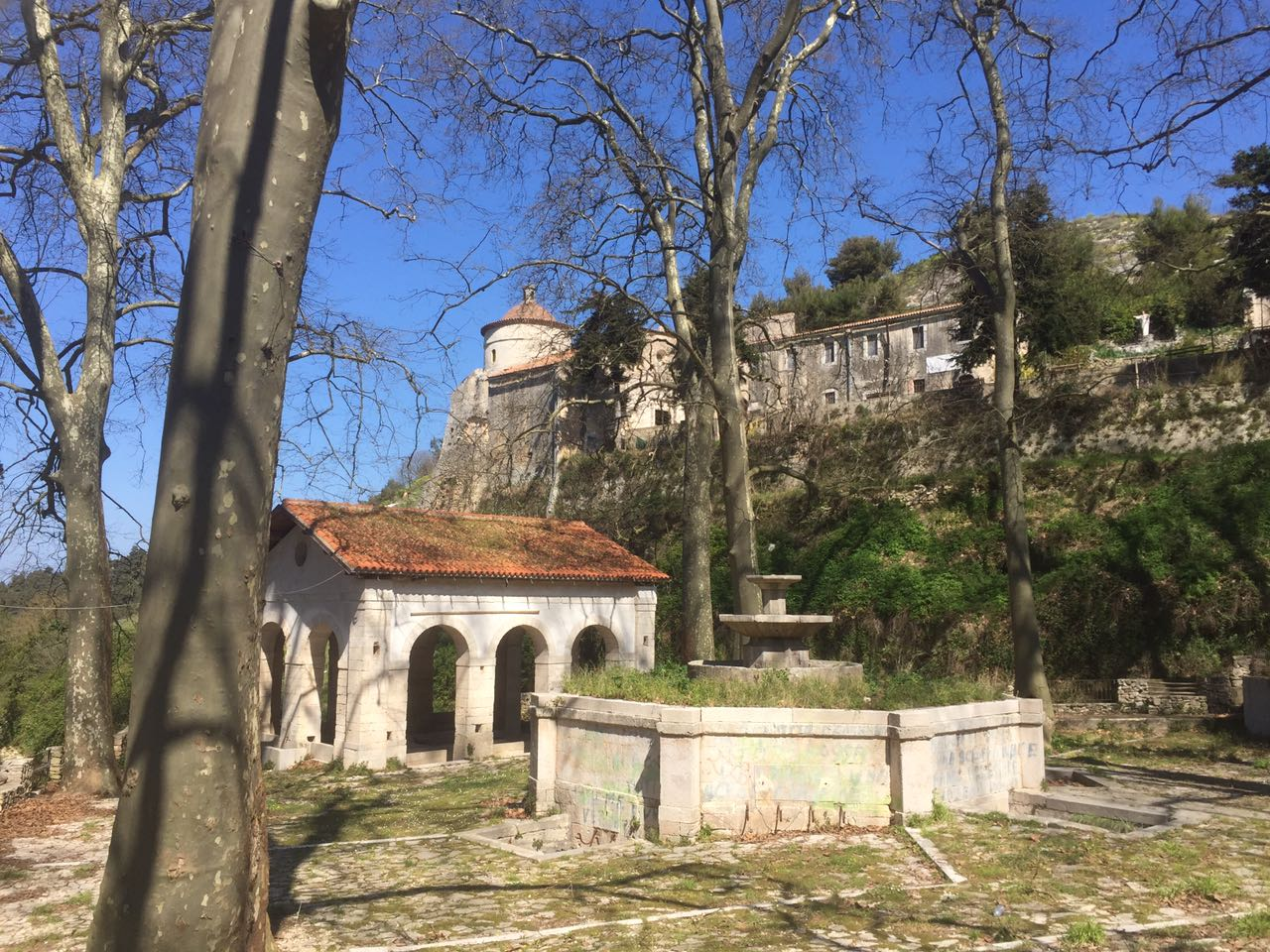 foto della fontana che è situata sotto la Chiesa Santa Maria degli Angeli